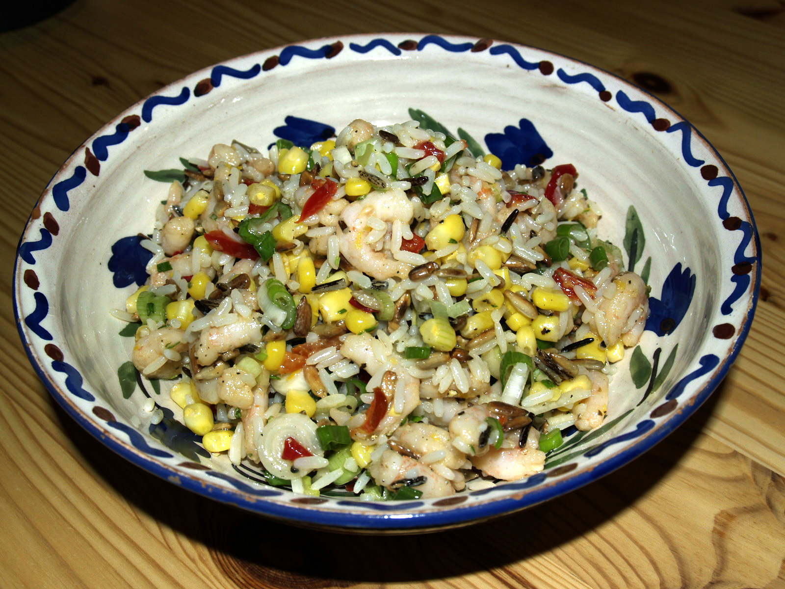 Rissalat med rejer